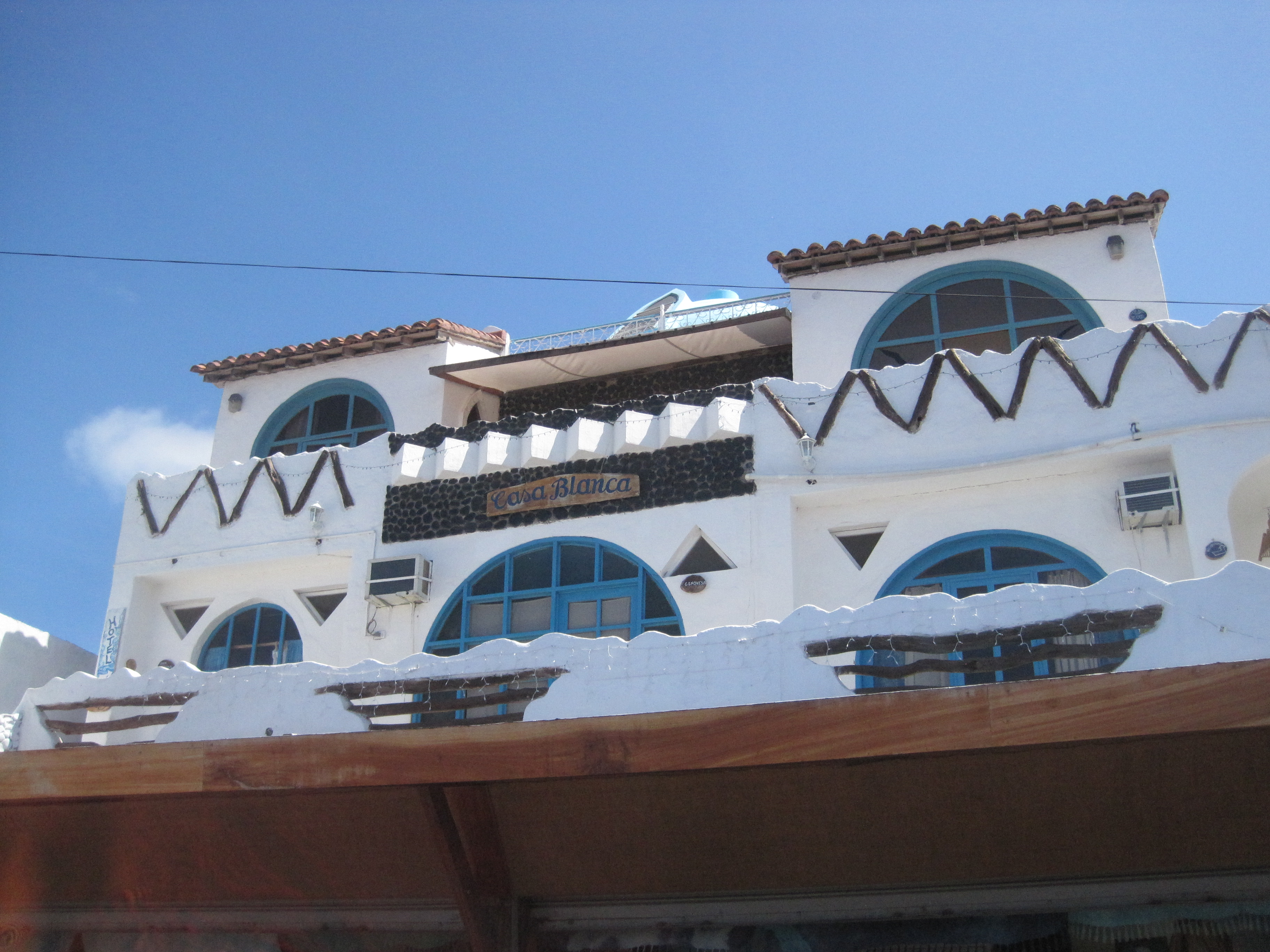 Hotel Casa Blanca, Puerto Baquerizo Moreno, San Cristobal island, Galapagos.